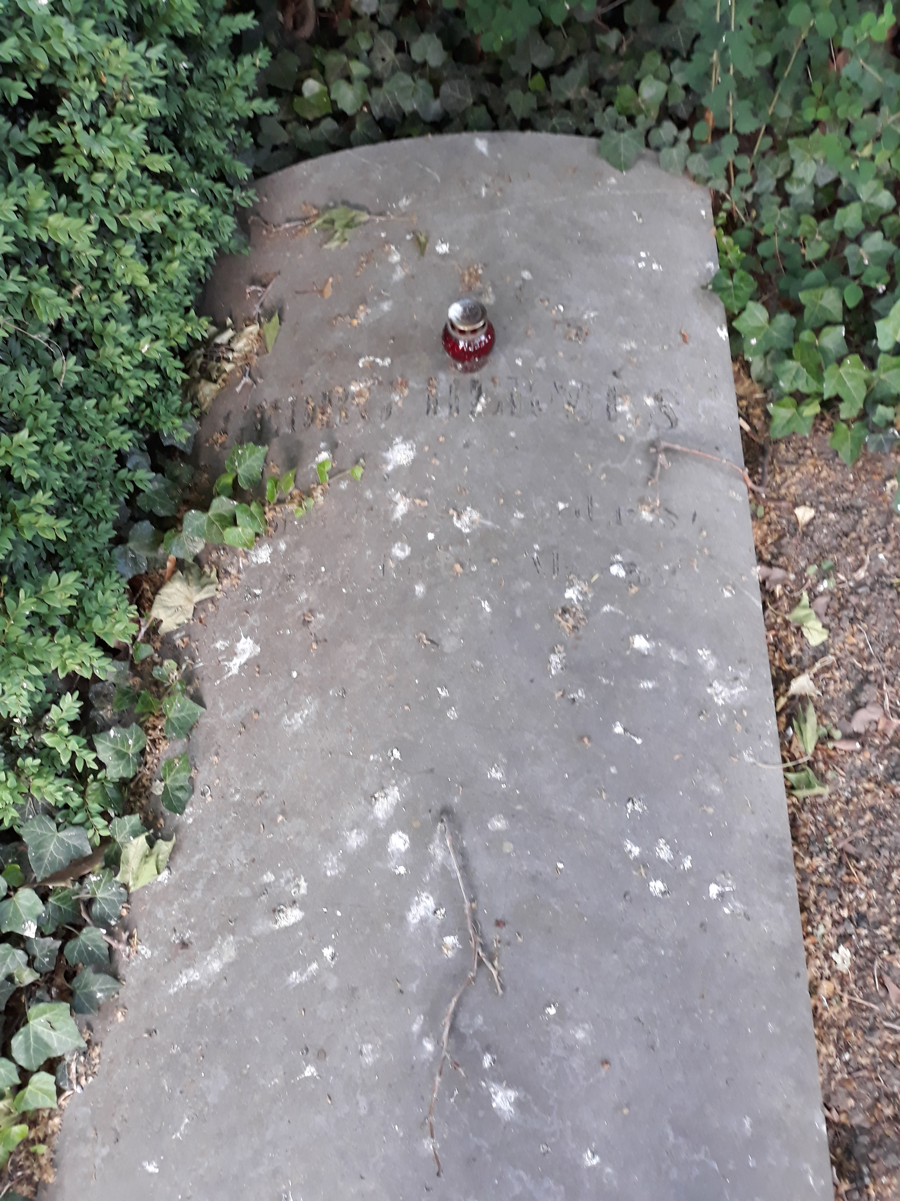 Das Grab des deutschen katholischen Theologen Georg Hermes auf dem Alten Friedhof Bonn.